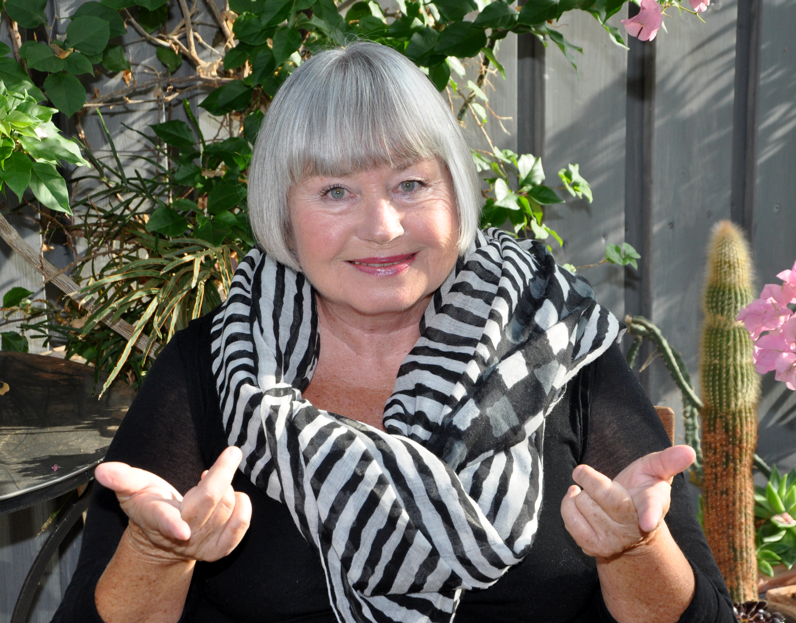 Aktuelles Bild von Vera C. Koin